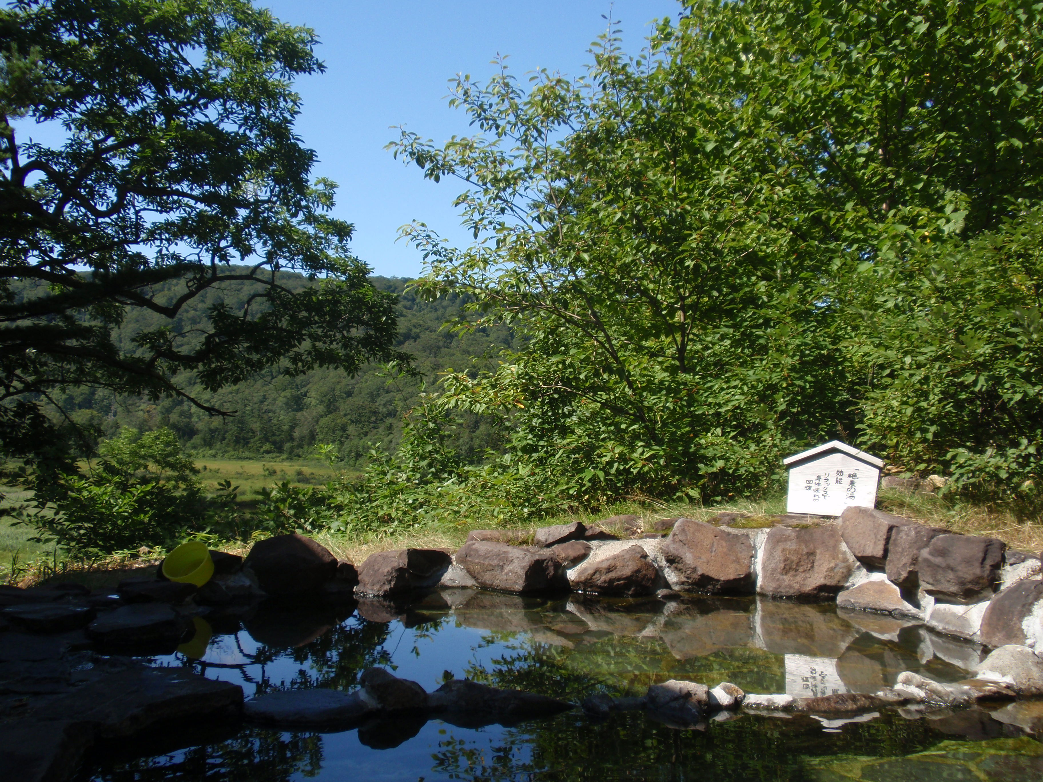 八幡平温泉郷、大沼温泉、露天風呂